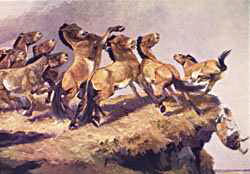 Les chevaux précipités de la roche de Solutré, une légende créée par les premiers préhistoriens